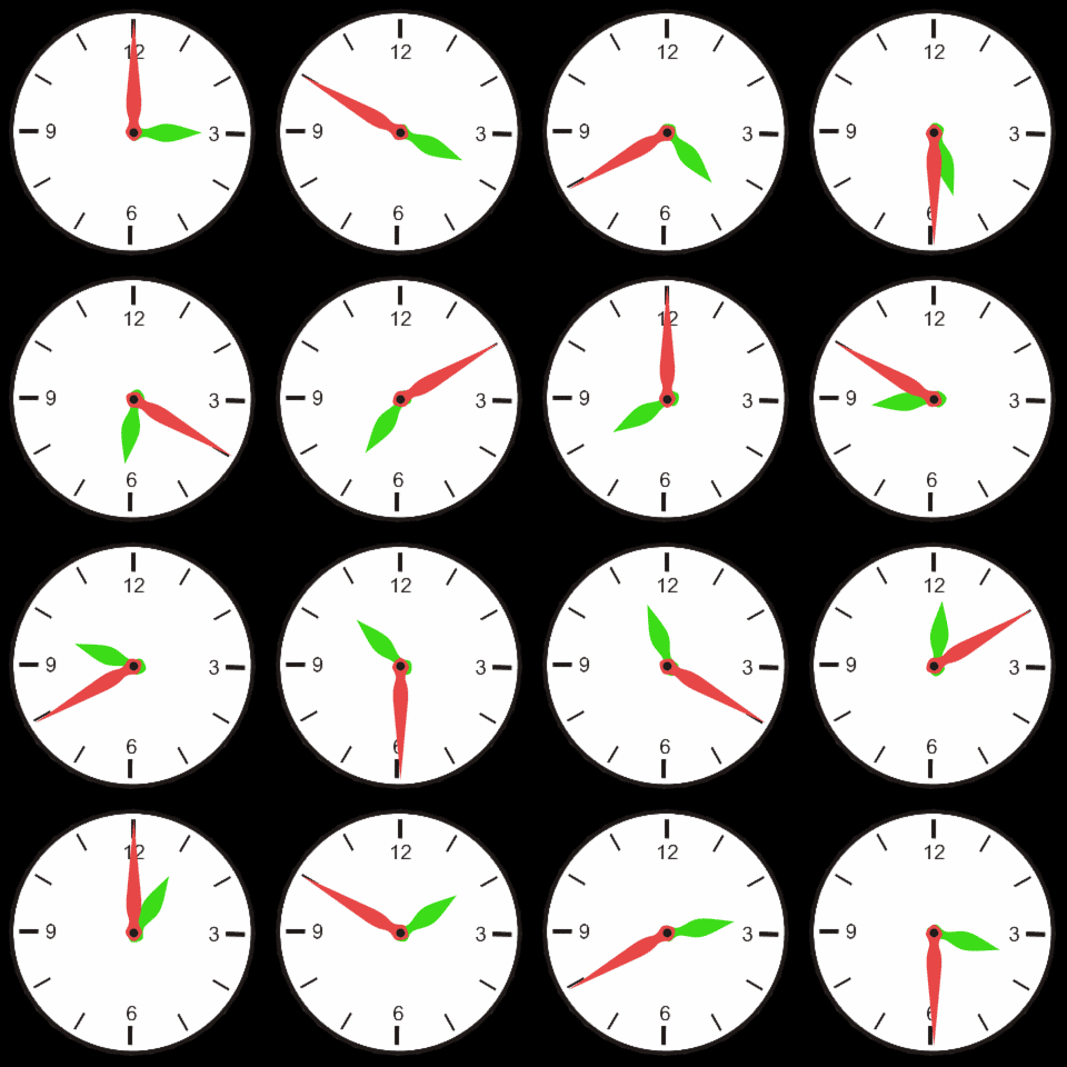 Obrázky hodin snímané po 50 minutách